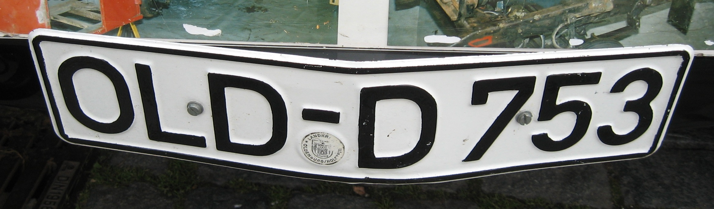 Altkennzeichen OLD an einem Fahrzeug der Heligenhafener Feuerwehr